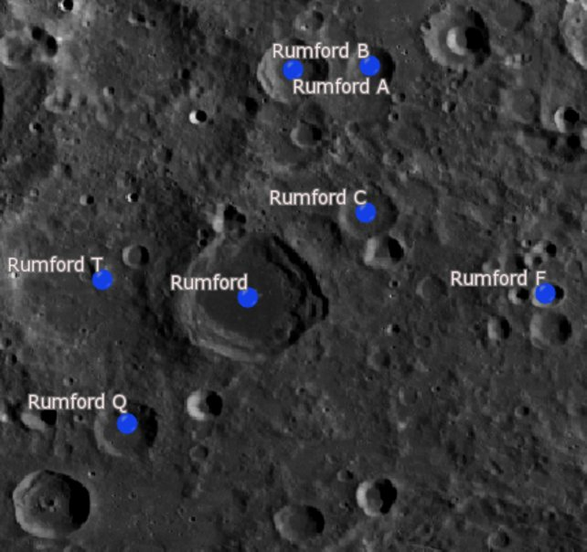 Cráter lunar Rumford. Cráteres satélite. (Imagen LRO)